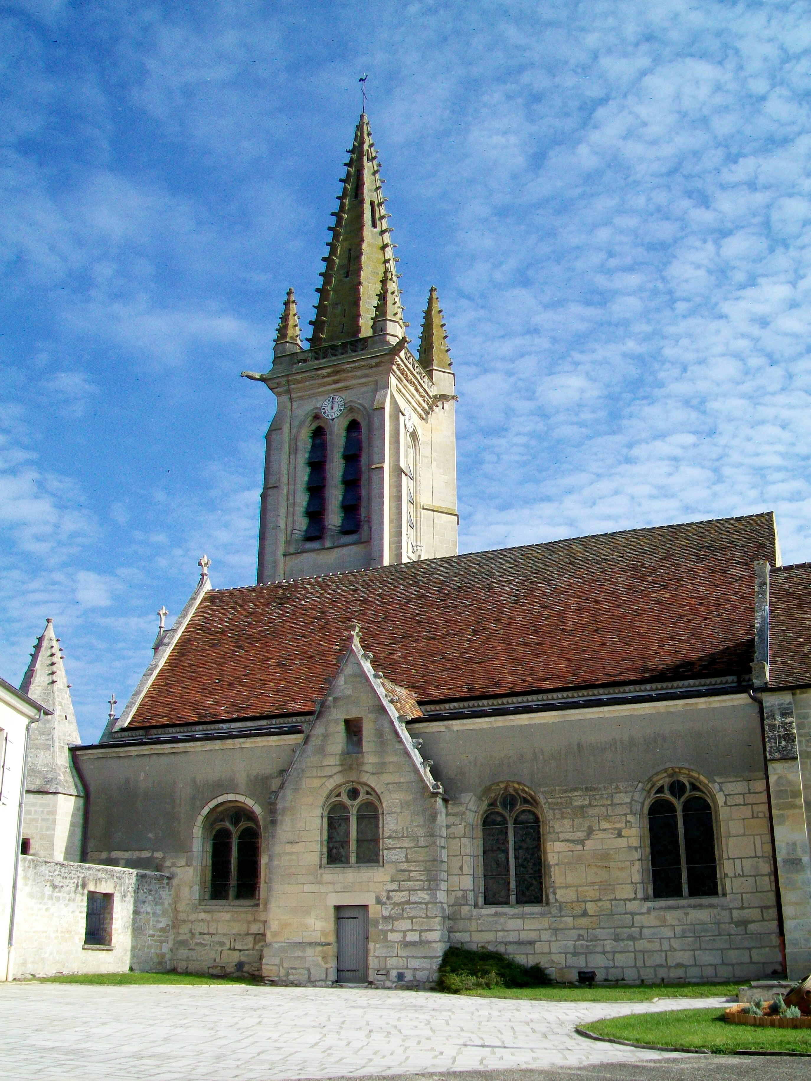 La nef et le clocher de l'église Saint-Vaast depuis le sud.